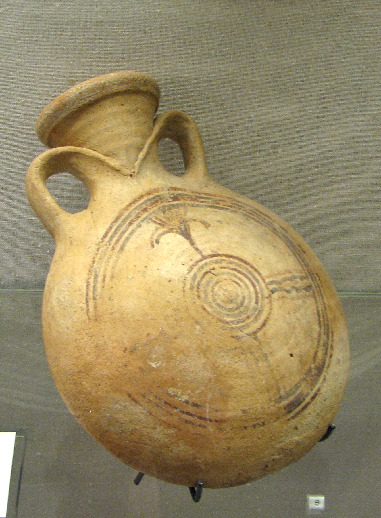 Late Bronze Age Period Pilgrim Flask in Hecht Museumת Haifa Israel ממצאים מתקופת הברונזה המאוחרת במוזיאון הכט בחיפה צפחת ממורקת וצבועה